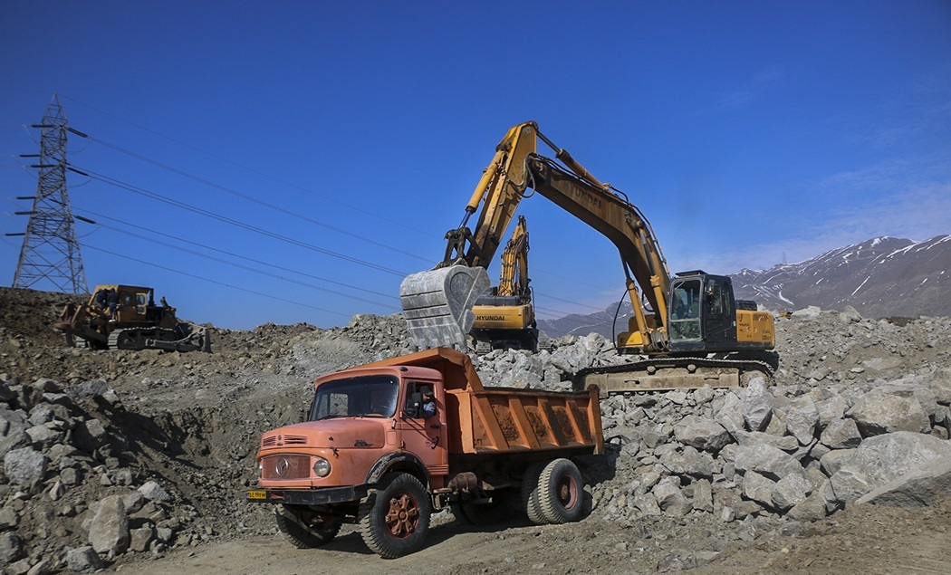 قطعه یک آزادراه تهران-شمال